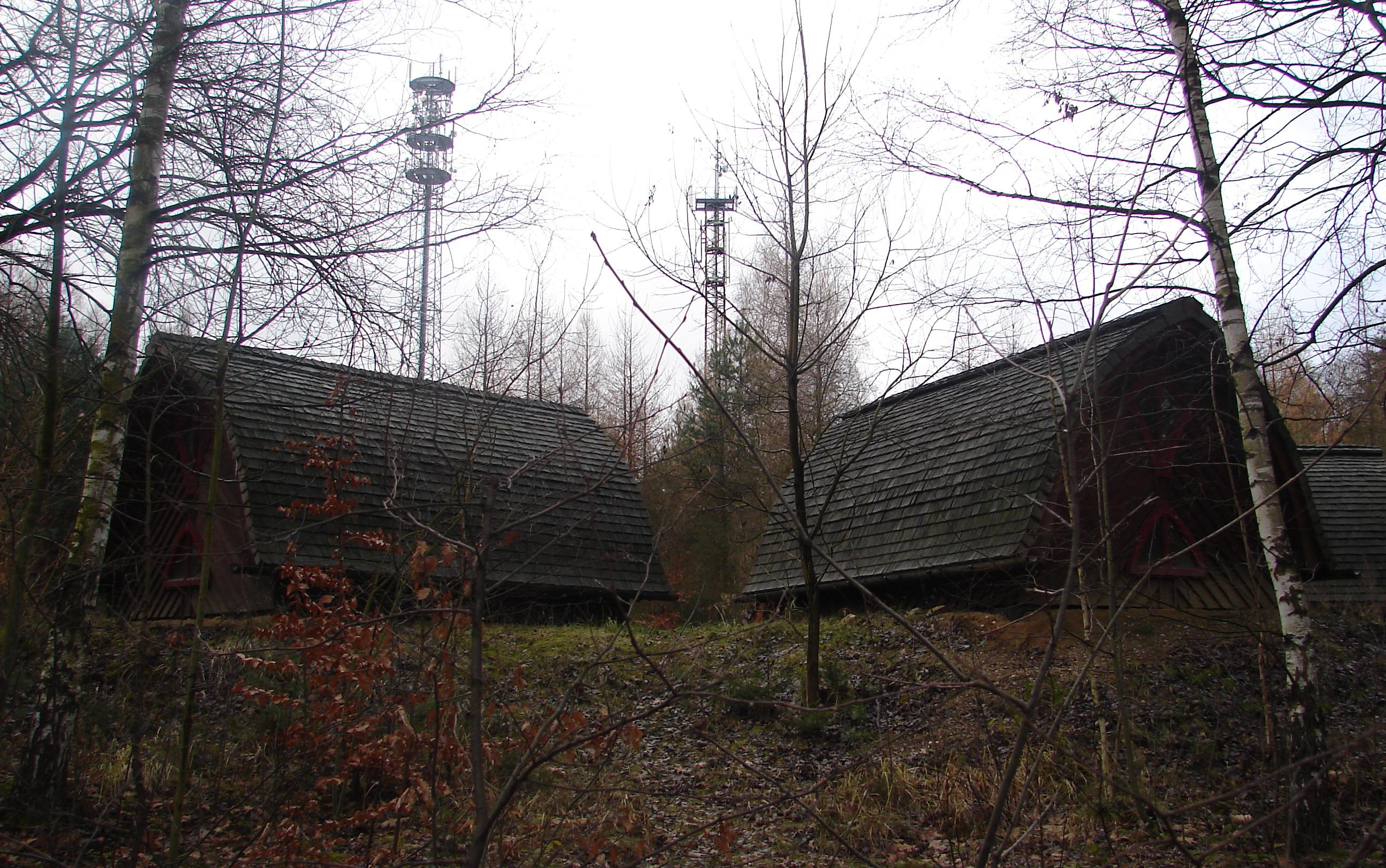 Auf dem Dachsenberg in der Dresdner Heide, Naju-Station und Telekom-Sendemasten